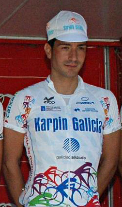 Carlos Castaño Panadero. Karpin-Galicia, Euskal Bizikleta 2008